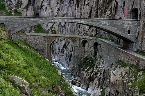 Teufelsbrücke in der Schöllenen